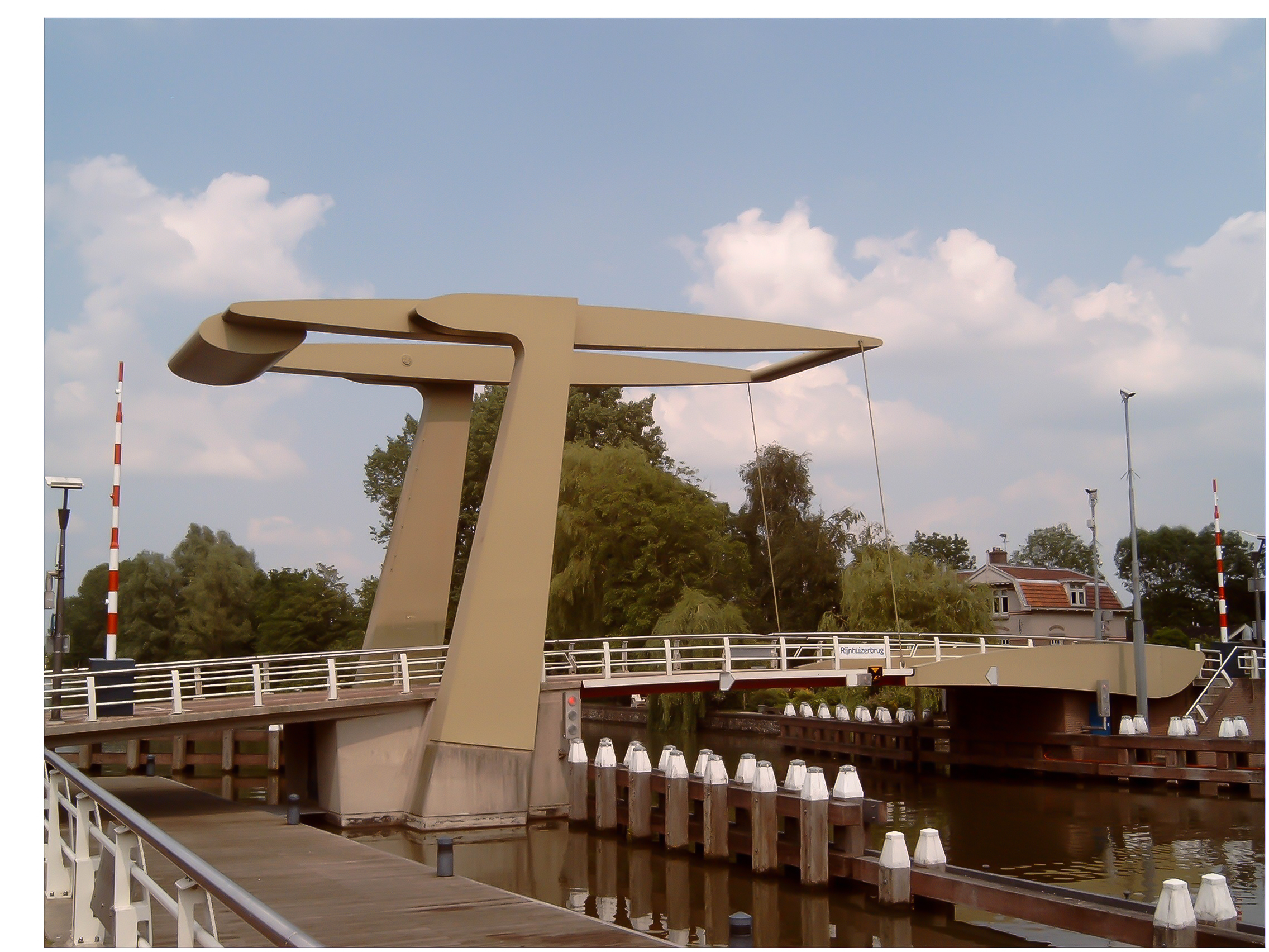 Nieuwegein, Rijnhuizerbrug, ophaalbrug